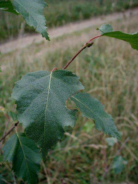 Betula pendula